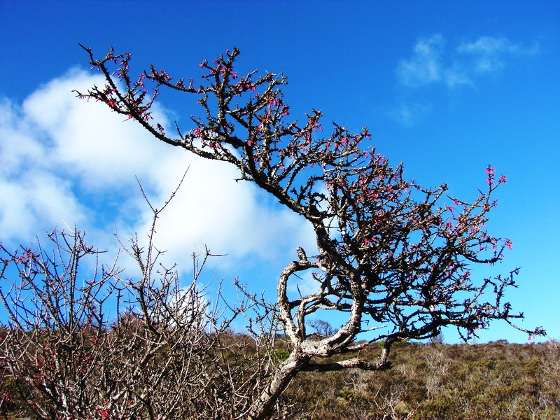 Fuchsia lycioides, otoño en el cerro Talinay, al sur de Huentelauquén, región de Coquimbo